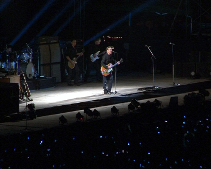 नेपाली: नेपालमा भएको ब्रायन एडम्सको सांगितिक कार्यक्रम